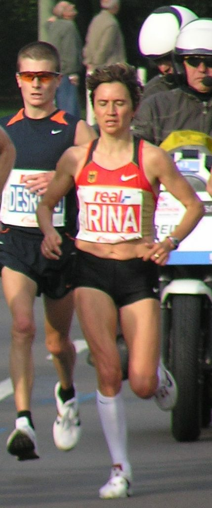 Irina Mikitenko beim Berlin-Maraton 2008